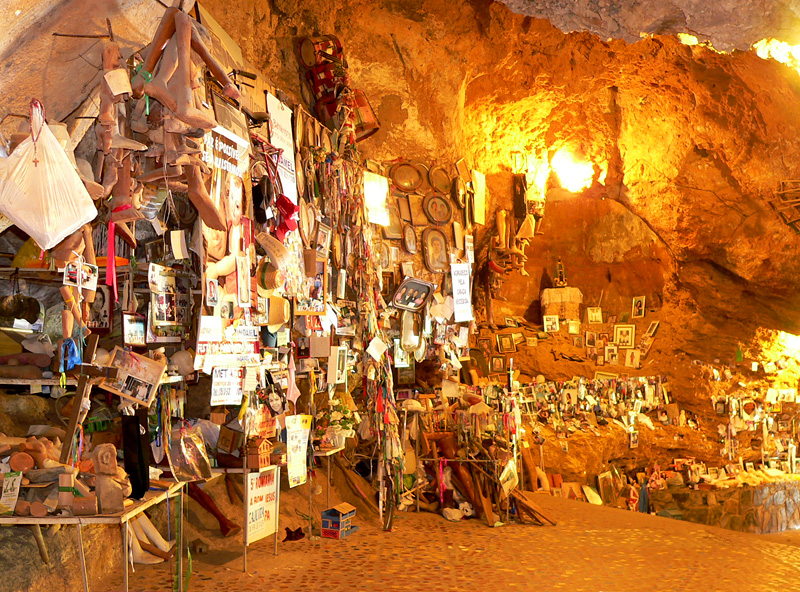 Santuário de Bom Jesus da Lapa.